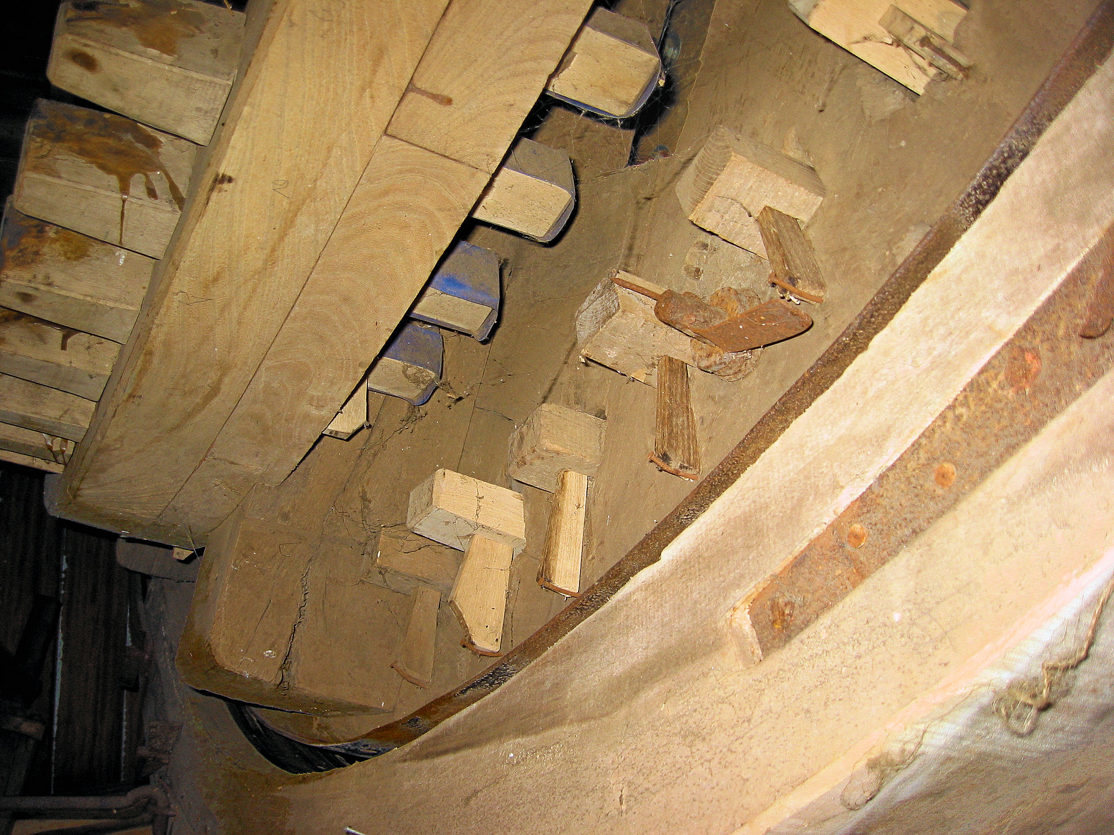 Achterkant bovenwiel met achterkrans van de molen Tot Voordeel en Genoegen in Alphen aan de Maas, the Netherlands.